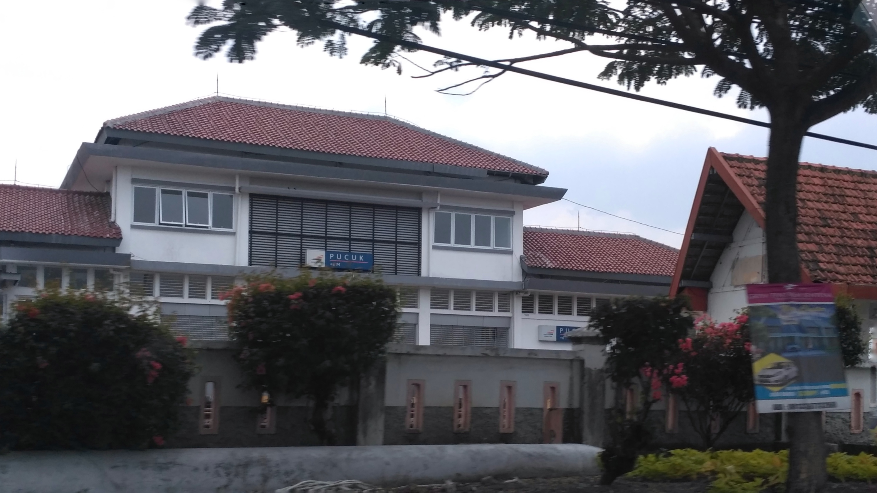 Bangunan baru Stasiun Pucuk ketika masih berada di belakang bangunan lama Stasiun Pucuk yang saat ini telah dibongkar